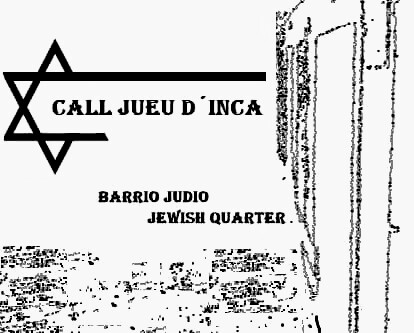 Nuevo logotipo barrio judio de inca